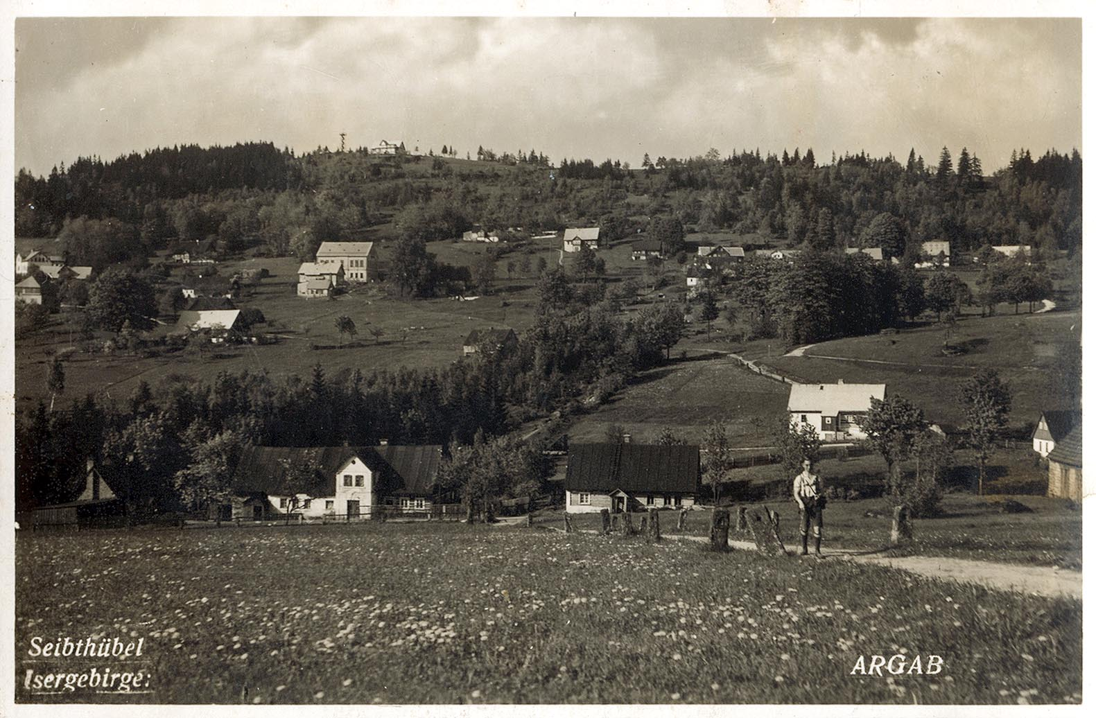 Seibthubel 2